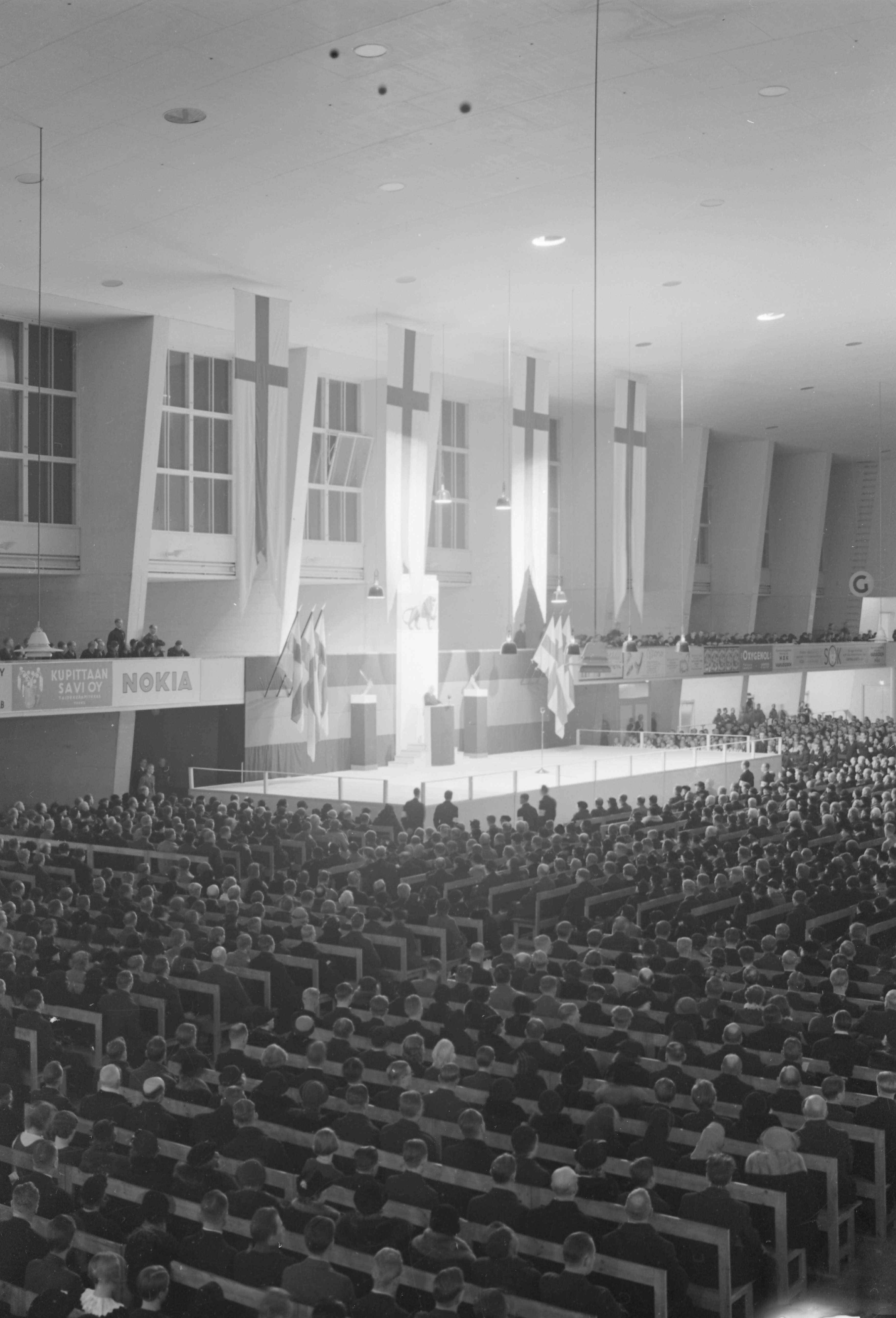 Isänmaallisen kansanliikkeen juhlakokous lokakuussa 1936 Helsingin Messuhallissa.